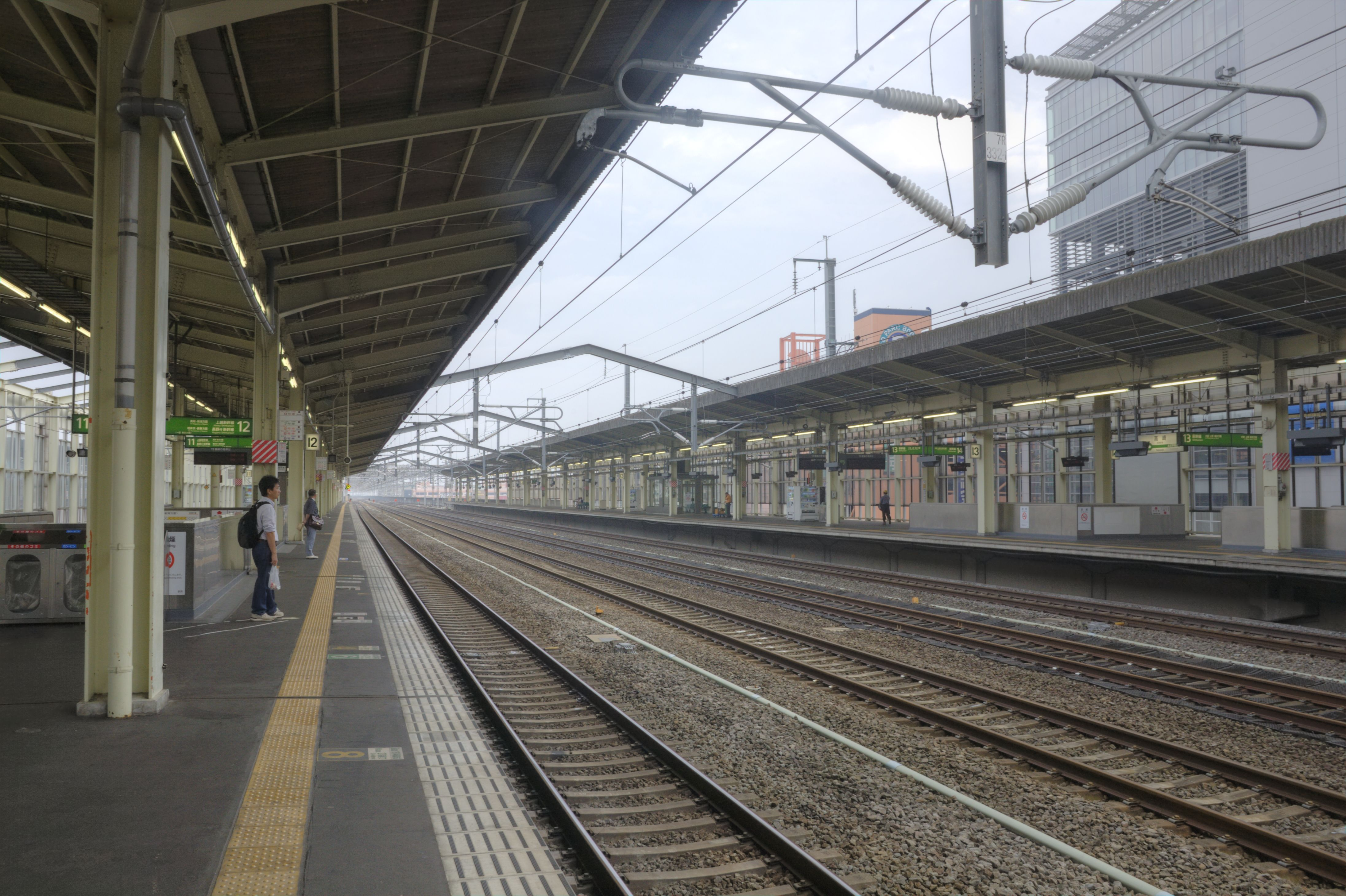 高崎駅